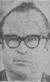 Arkitektern Henrik Schager